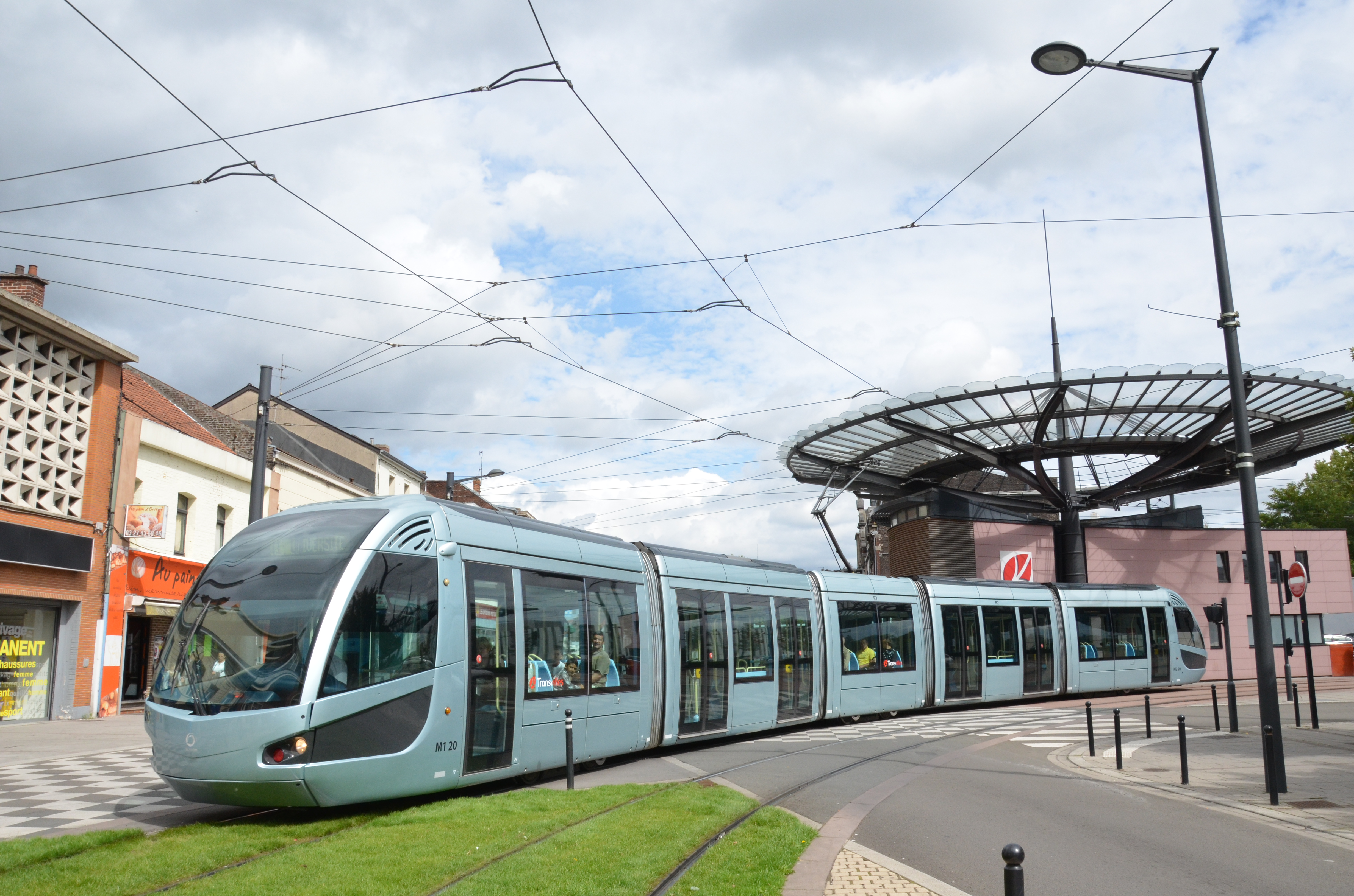 Alstom Citadis 302 n°20 sur la ligne T1 du réseau TRANSVILLES de Valenciennes, près du terminus Espace Villars à Denain.